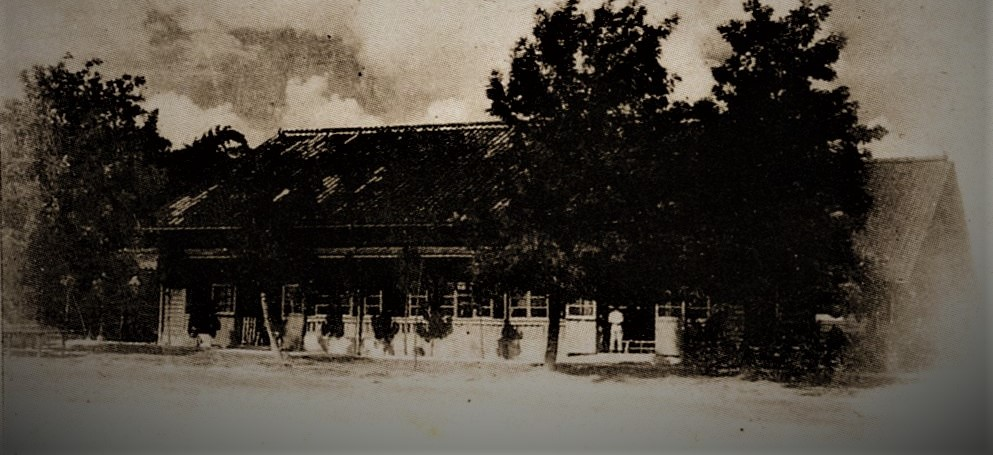 中文（台灣）: 台中二中史料